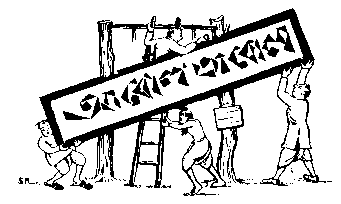 Cartoon by Sukumar Ray.